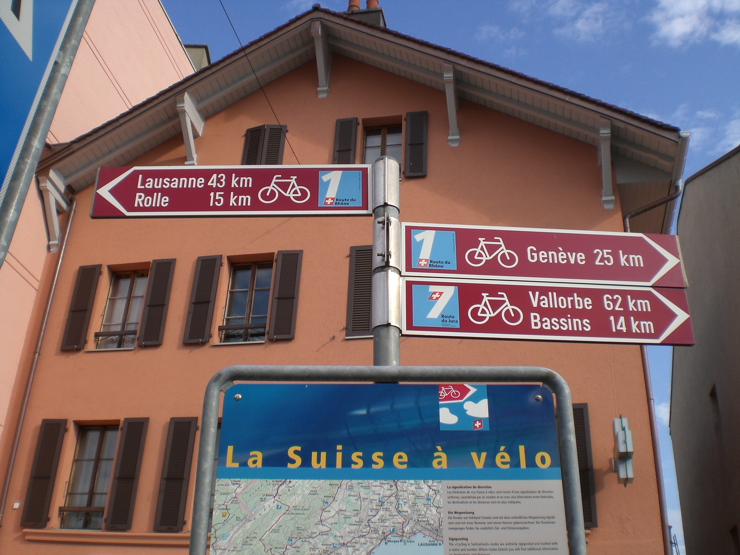 Panneaux indicateurs au départ de la route cycliste 7, à Nyon